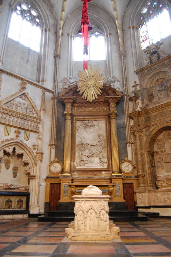 Capilla de San Ildefonso de la catedral de Toledo (España). Capilla funeraria del cardenal Gil Ávarez de Albornoz.